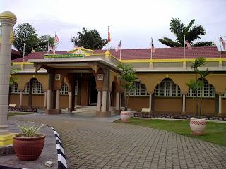 Istana Jemaah yang diwakafkan oleh Sultan Selangor